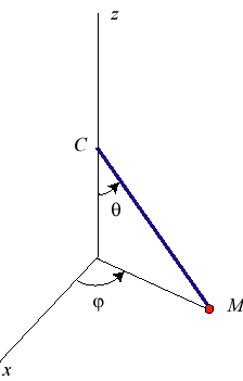 schéma pendule sphérique 2 r ferreol